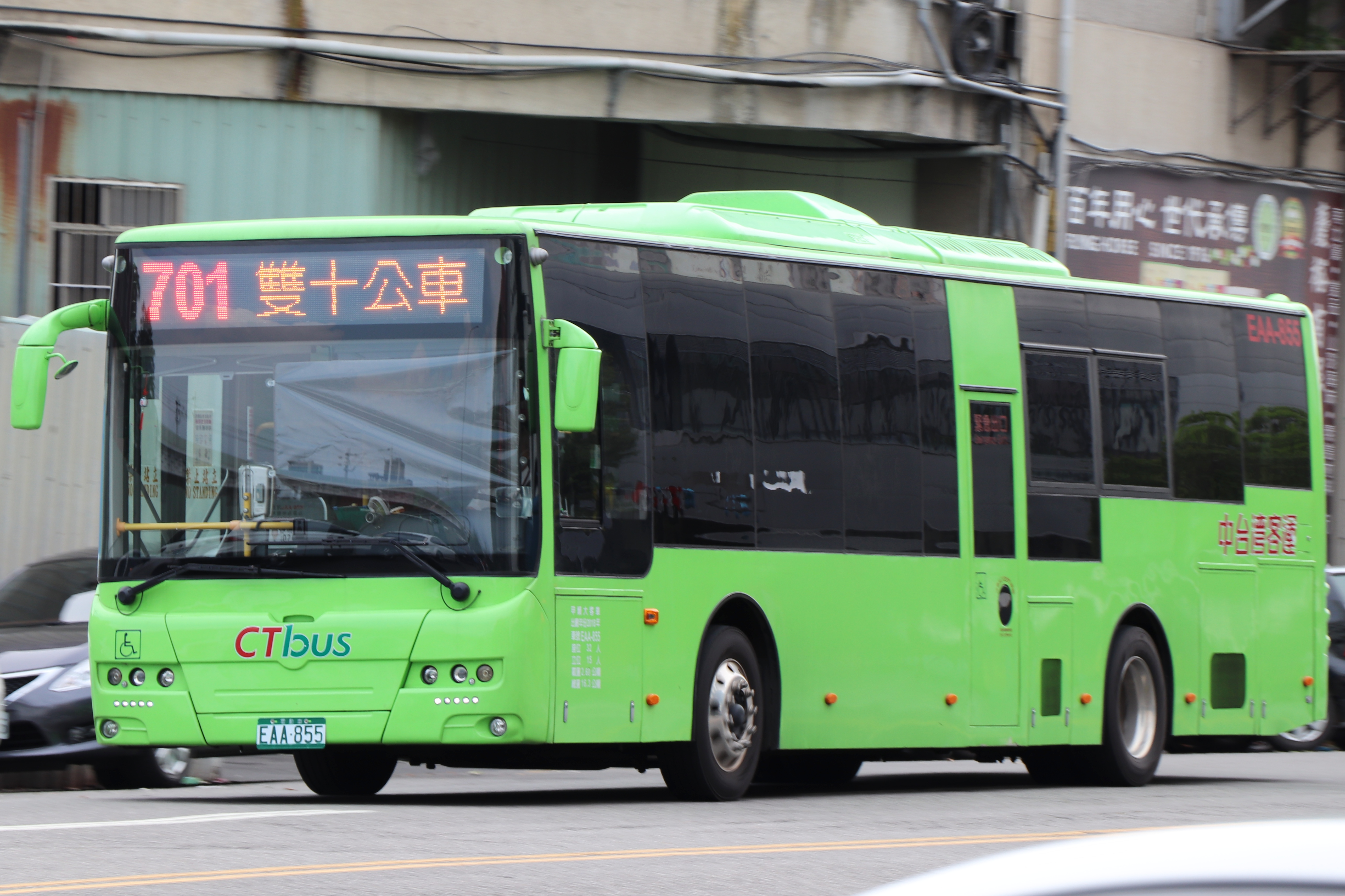 統聯客運 金旅XML6125JEV大客車EAA-855 行駛台中市公車701路。